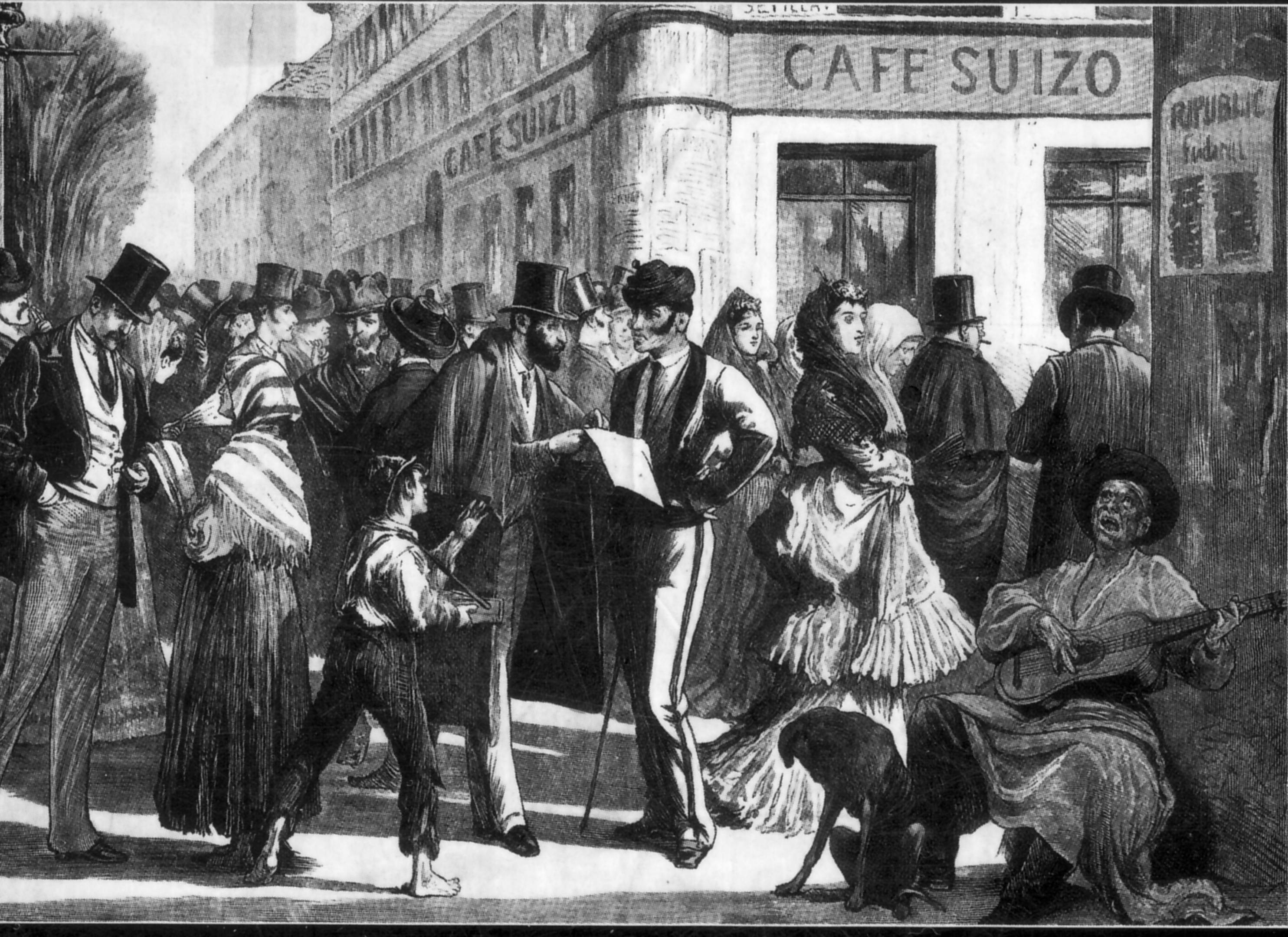 Dibujo (alegoría del Madrid de la segunda mitad del siglo XIX) con varios tipos castizos ante el Cafe Suizo, con un cartel de la proclamación de la República Federal.